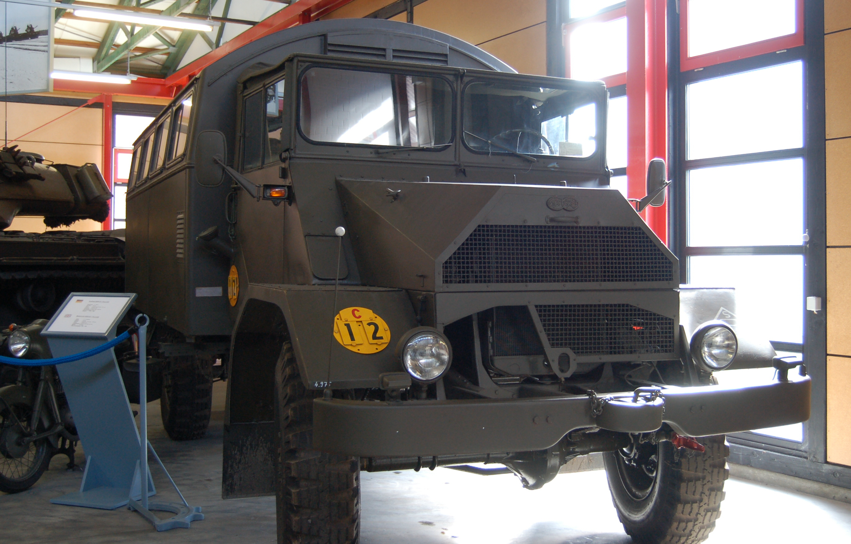 Lastkraftwagen 3 t gl (4 x 4) Ford 398 SAM (Natoziege)*Besatzung: 1 + 2 Soldaten Gewicht 4,69 Tonnen Motorleistung: 68 kW (92 PS) Baujahr: 1957 - 1961 Stückzahl: 2.582